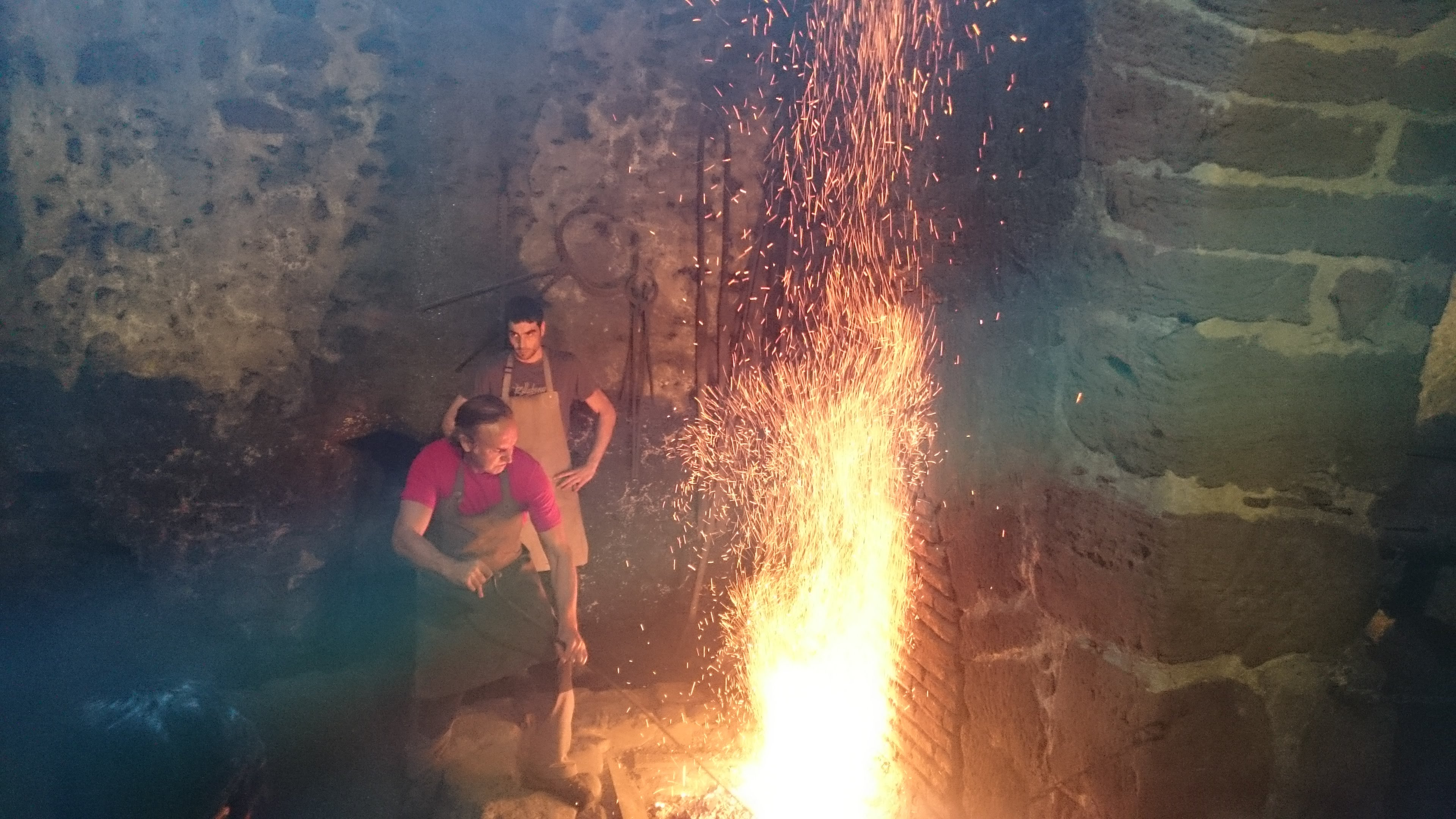 Demostración en la Ferrería El Pobal